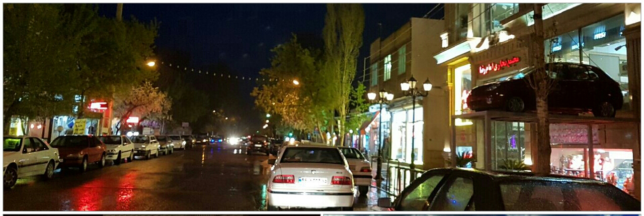 خیابان امام خمینی